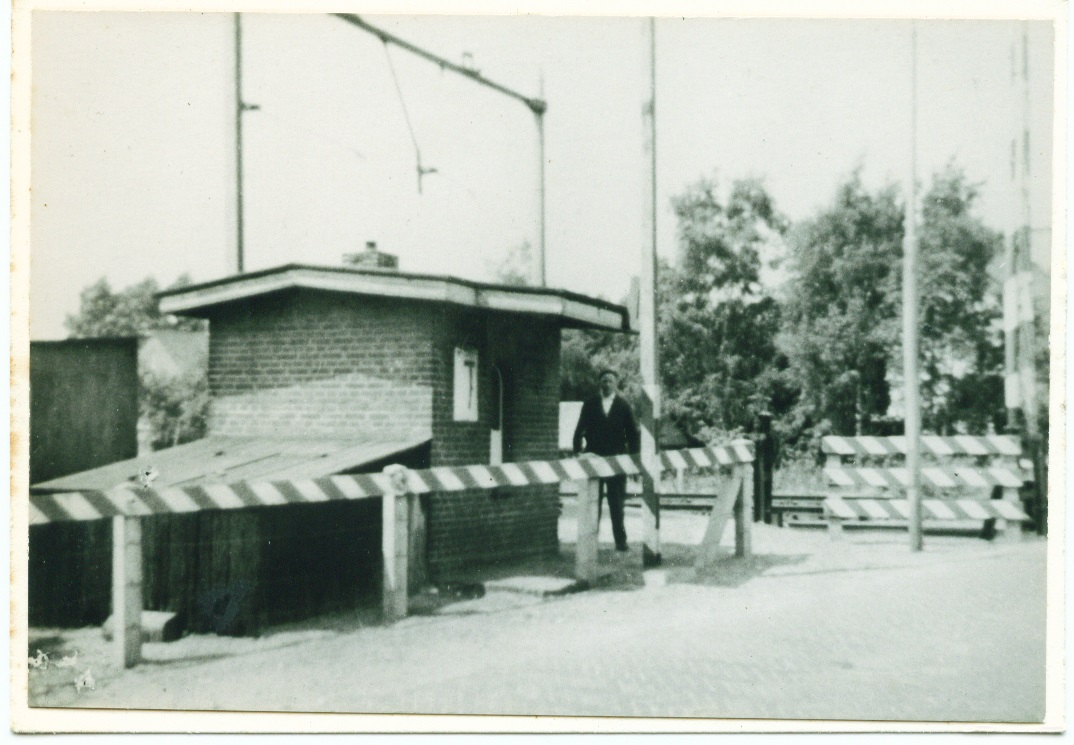 Wachthuisje bij Wachtpost 18 met spoorwegwachter Bart Heijmans